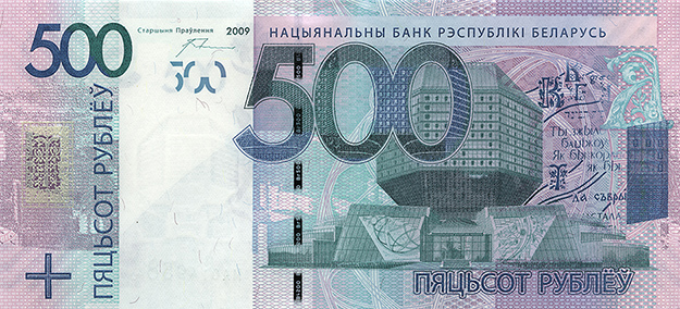 500 белорусских рублей образца 2009 года (лицевая сторона)